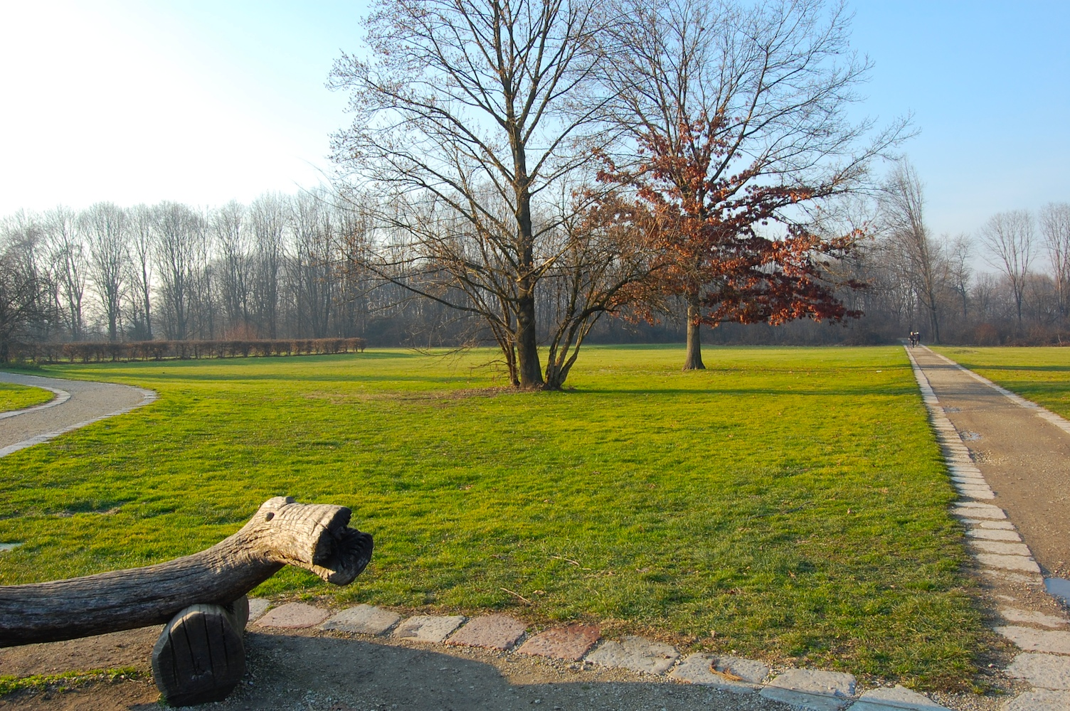 Bosco in Città view Milano (italy)